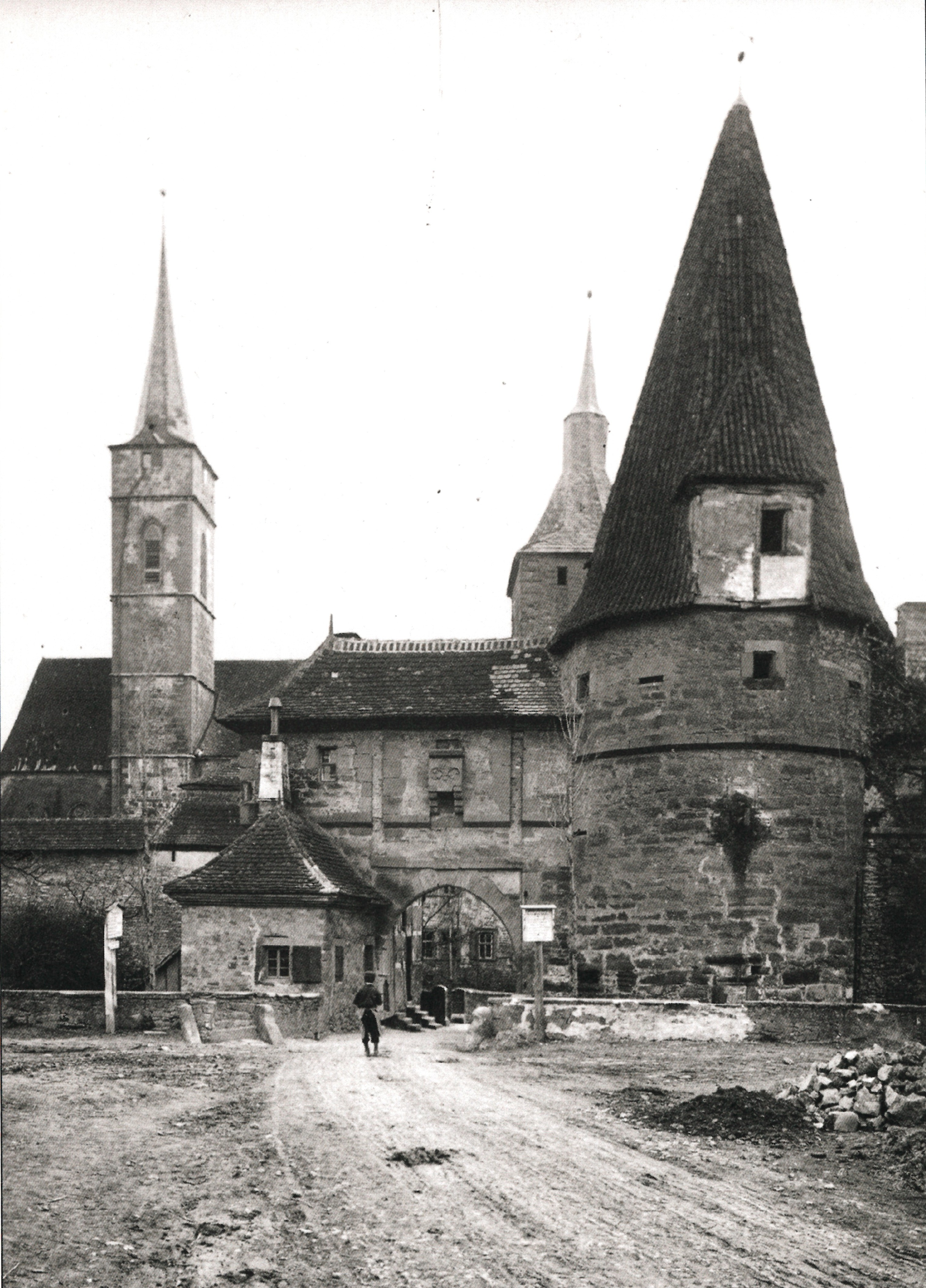 Fotografie: Rödelseer Tor, 1908, von links nach rechts: Pfarrkirche St. Veit, Rödelseer Tor, Mittagsturm